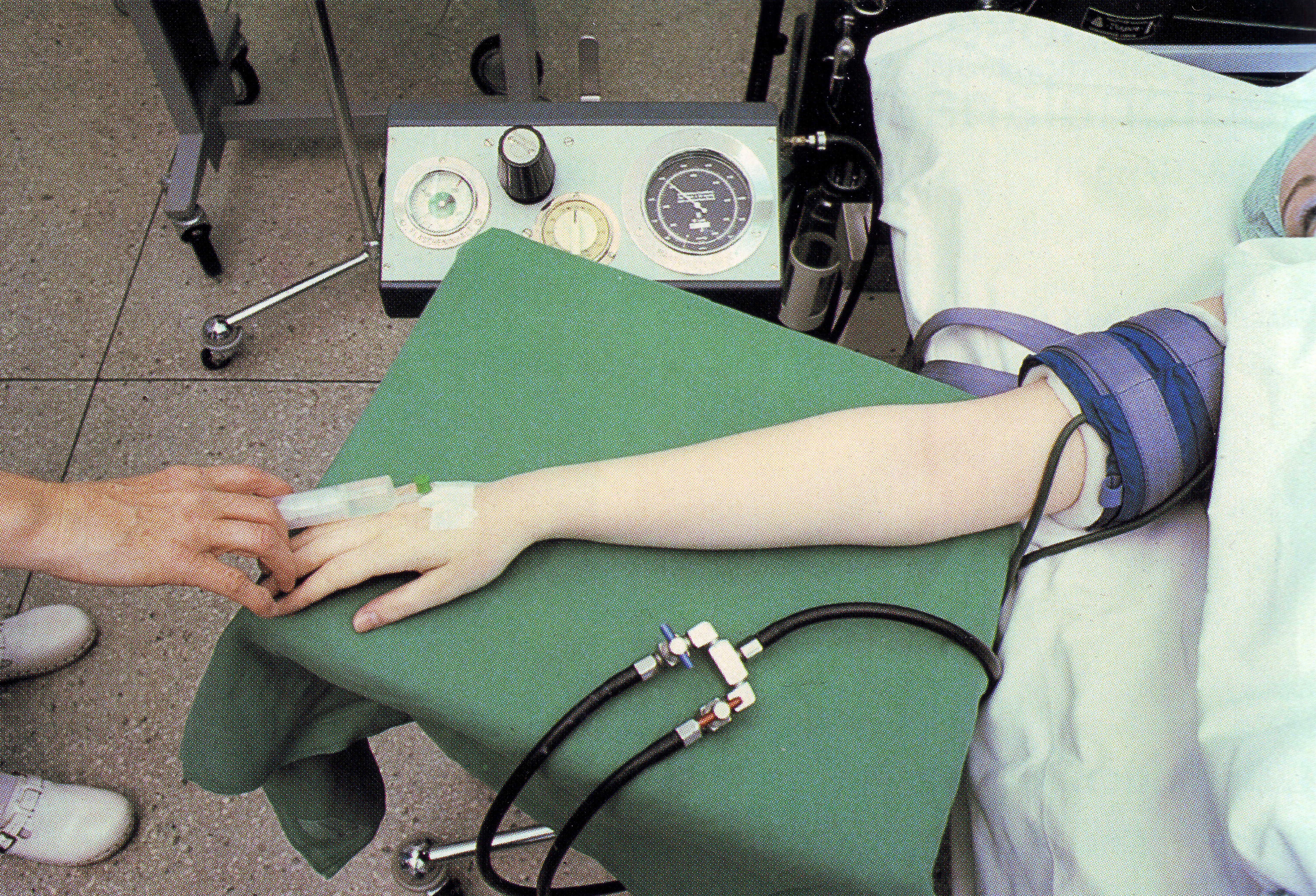 Venadaxili regional anesteyiza